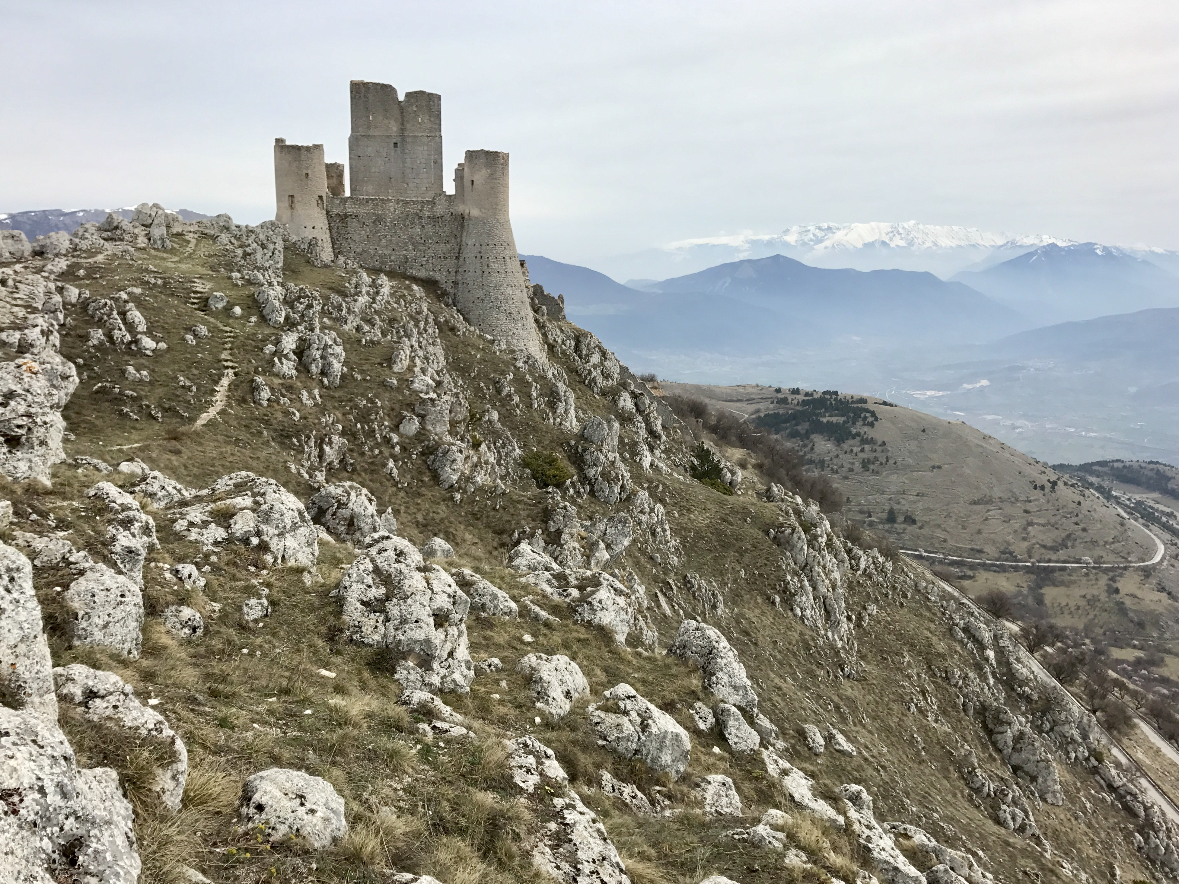 Rocca Calascio.